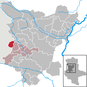 Harbke in Saxony-Anhalt (Country) - District (Landkreis) Börde